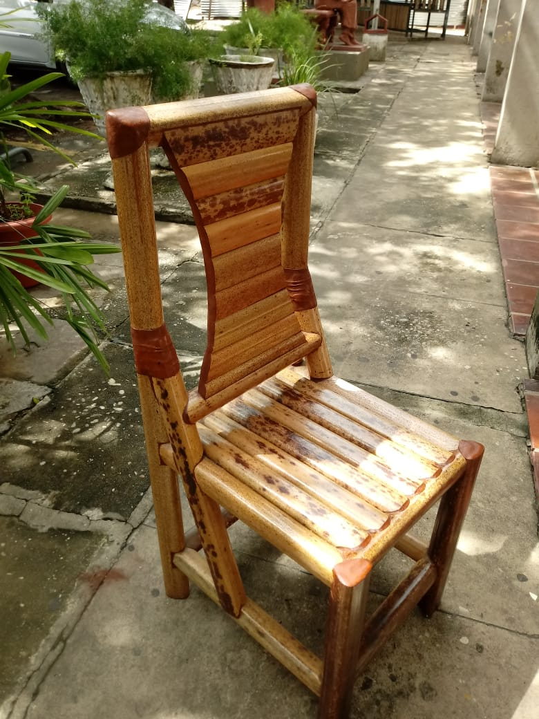 Poltrona, ou cadeira, feita de talo da palmeira babaçu. Esta é no Centro Cultural Mestre Dezinho, em Teresina-Piauí.